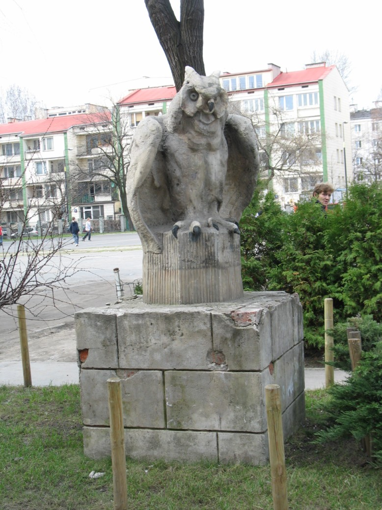 Owl